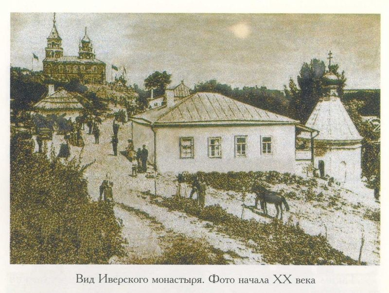 Ростов на Дону Иверский женский монастырь